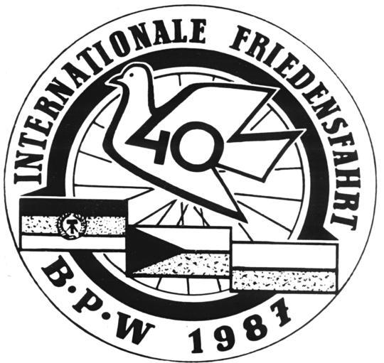 Friedensfahrt, Logo ADN-ZB Repro 4.4.87 Berlin: Das Fahren der 40. Internationalen Friedensfahrt Berlin-Prag-Warschar vom 8. bis 13. Mai 1987